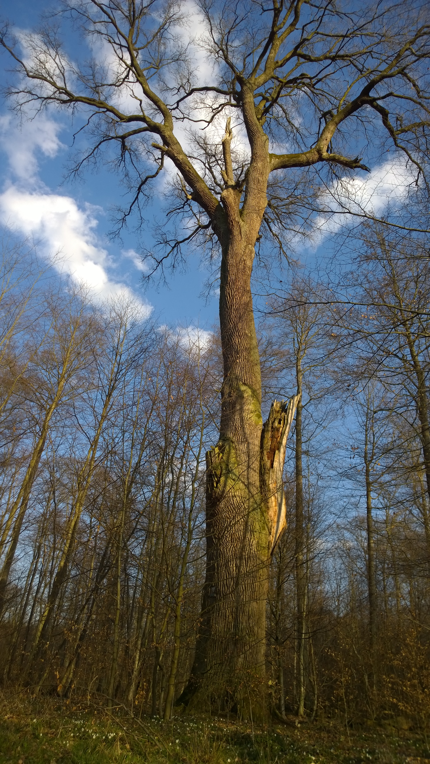 Gambseiche, Naturdenkmal in Groß-Umstadt, Gesamtansicht